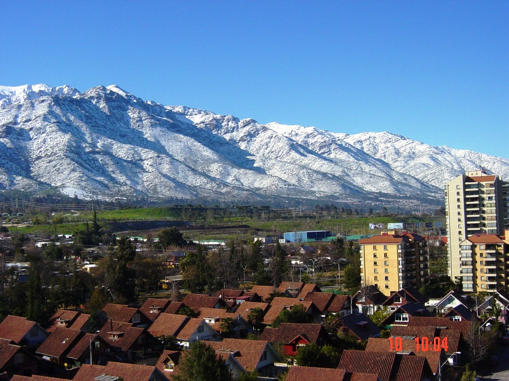 Pre Cordillera nevada Santiago Chile